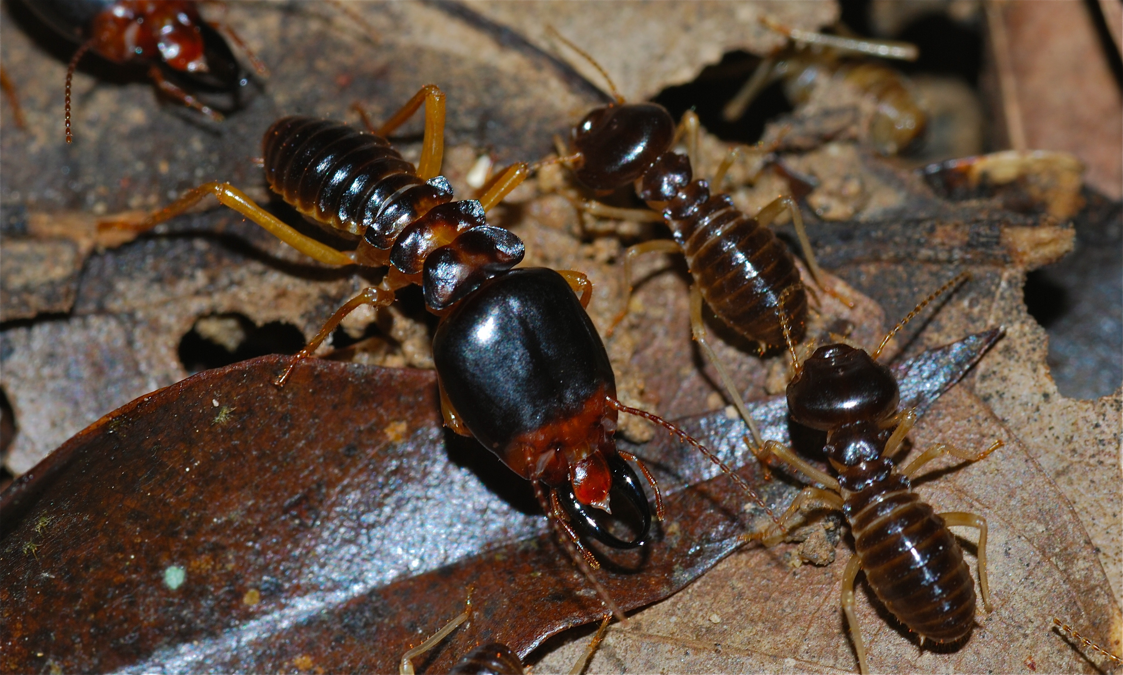 Taman Negara NP, Pahang, MALAYSIA